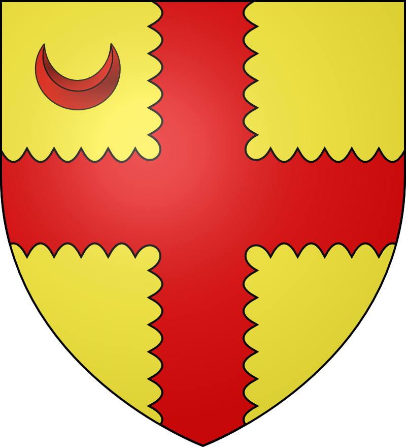 D'or à la croix engrelée, accompagnée au premier canton d'un croissant, le tout de gueules.